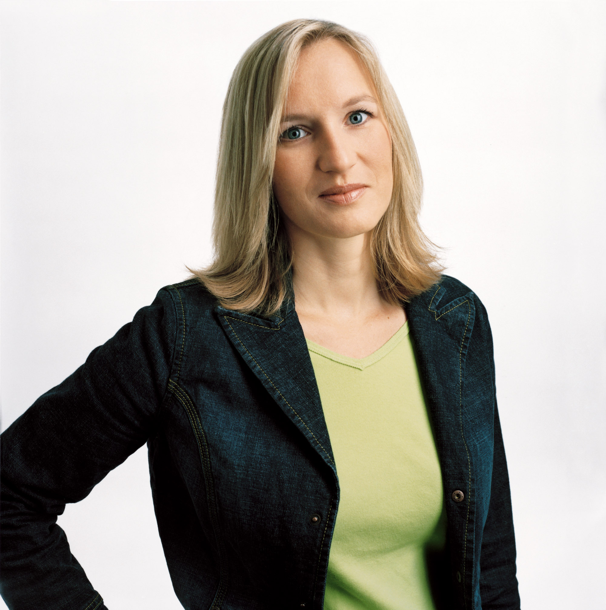 Sabine Gretner. Wiener Landtagsabgeordnete und Mitglied des Wiener Gemeinderats (Die Grünen)